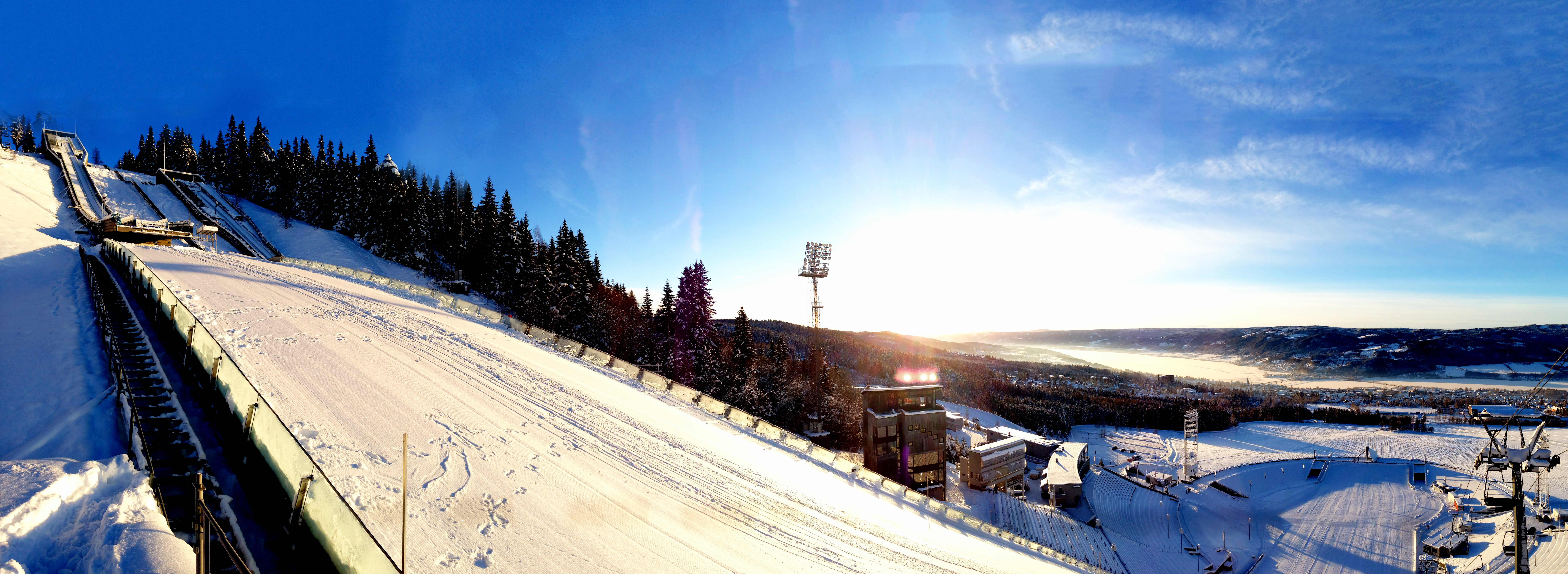 Photo: Alexander Eriksson